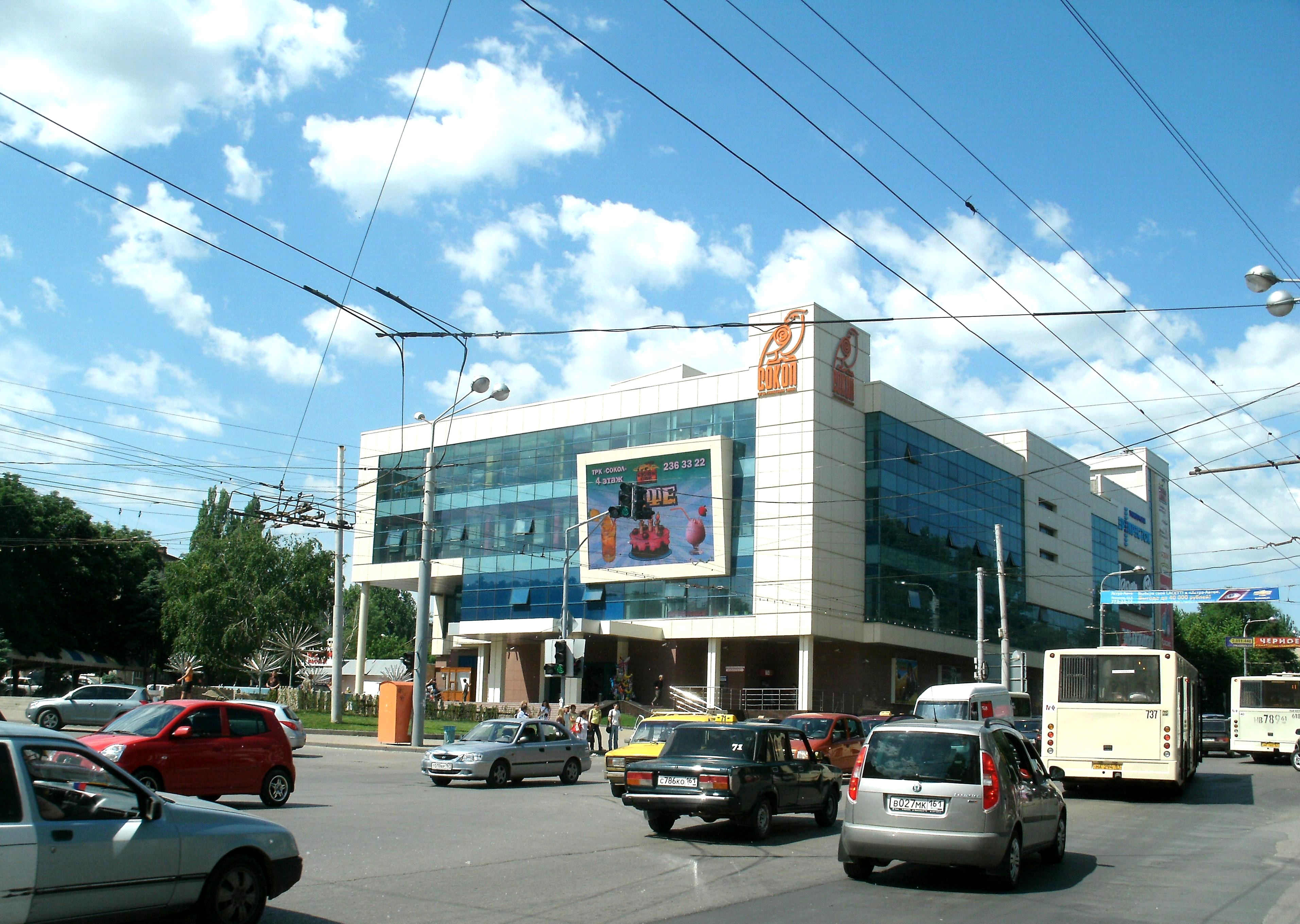 Торговый центр Сокол, Ростов-на-Дону